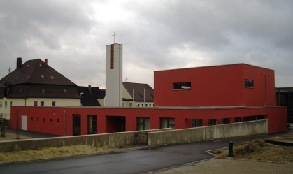 Rückseitenansicht der Auferstehungskirche in Wolnzach